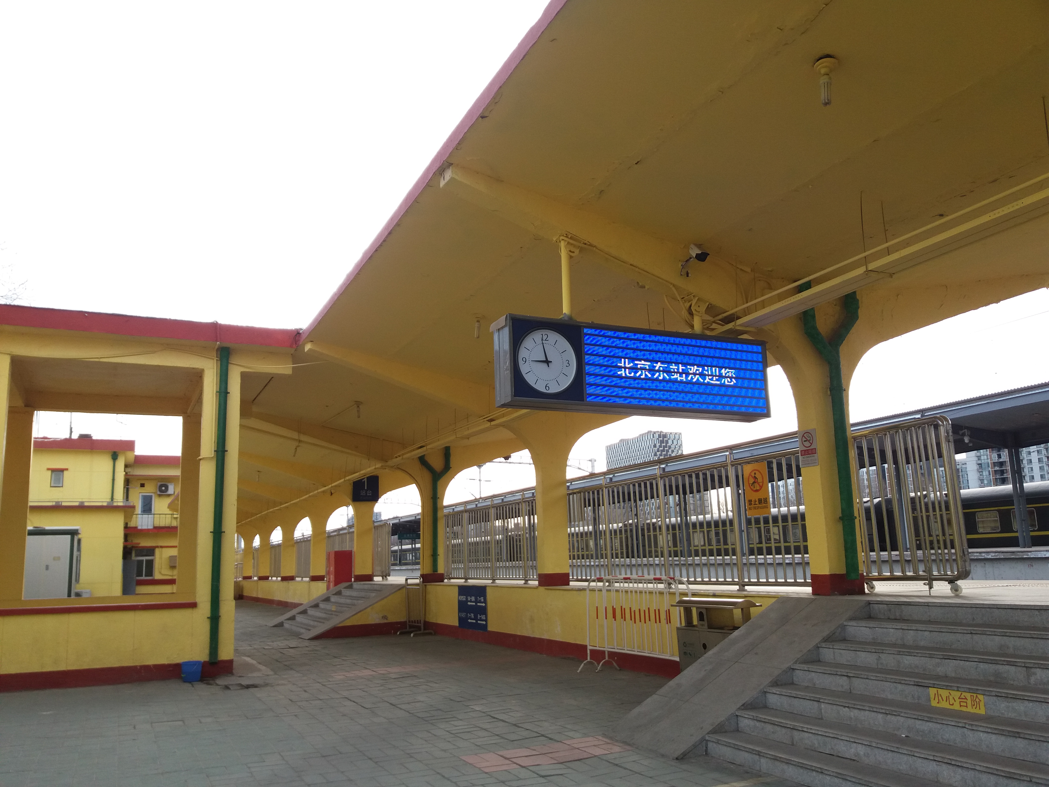 北京东火车站